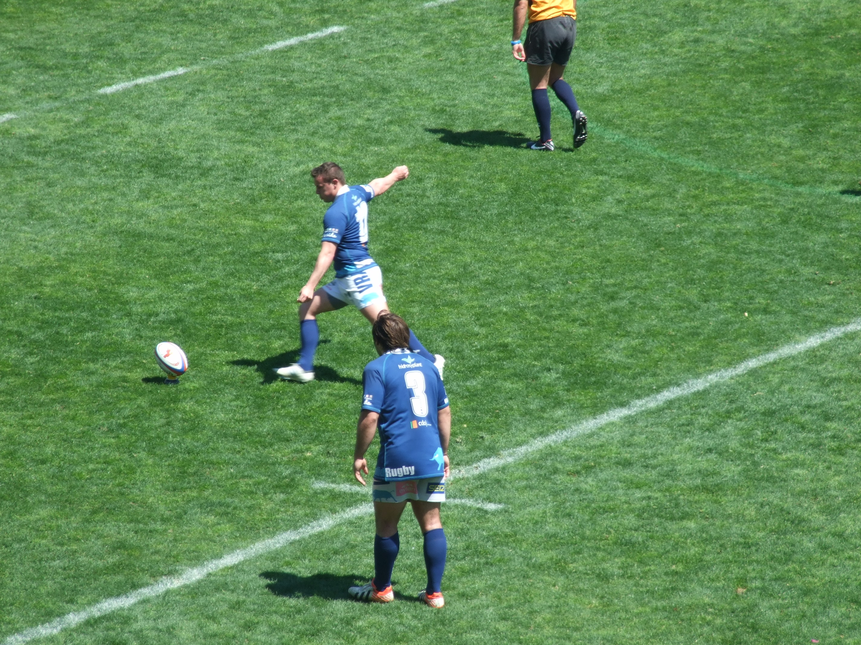 Copa del Rey de rugby 2013. VRAC Quesos Entrepinares ante AMPO Ordizia.